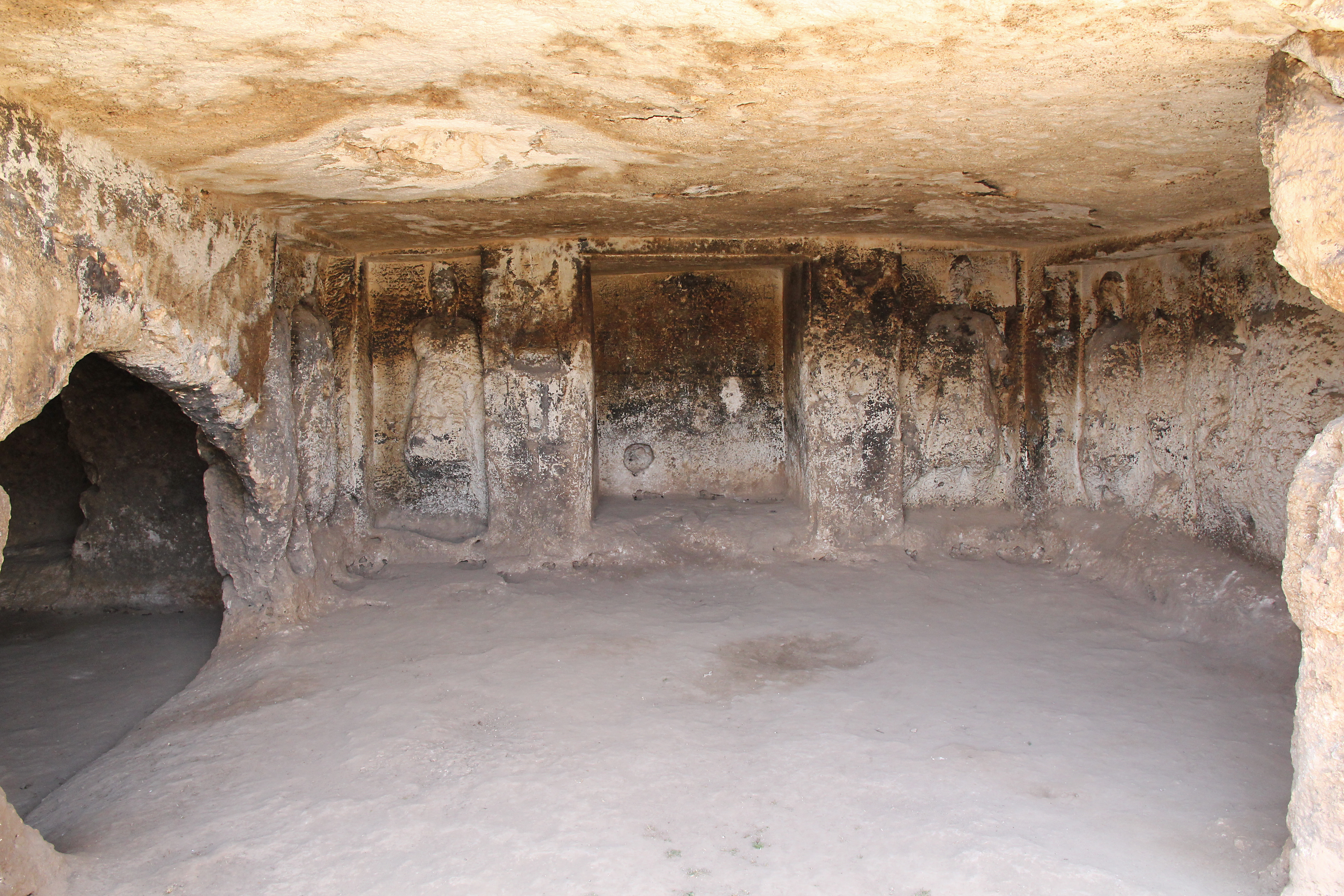 Sumatar, Kultstätte der Sabier in der Südosttürkei, Grotte mit Reliefs und Inschriften